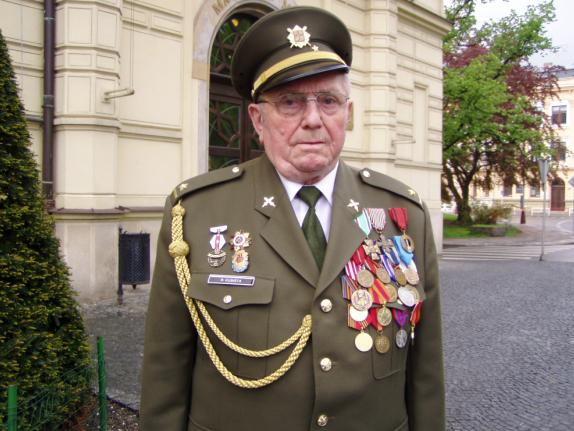 Česky: Mjr. v.v. Rostislav Kubišta v roce 2005 v Mladé Boleslavi